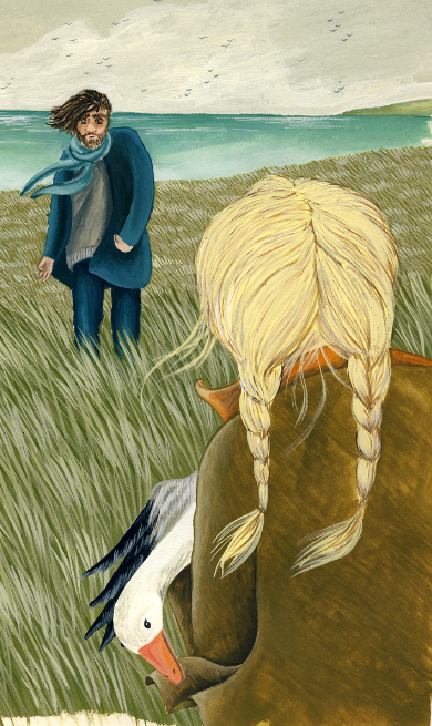 Rhayader, elur-antzara eta Fritha